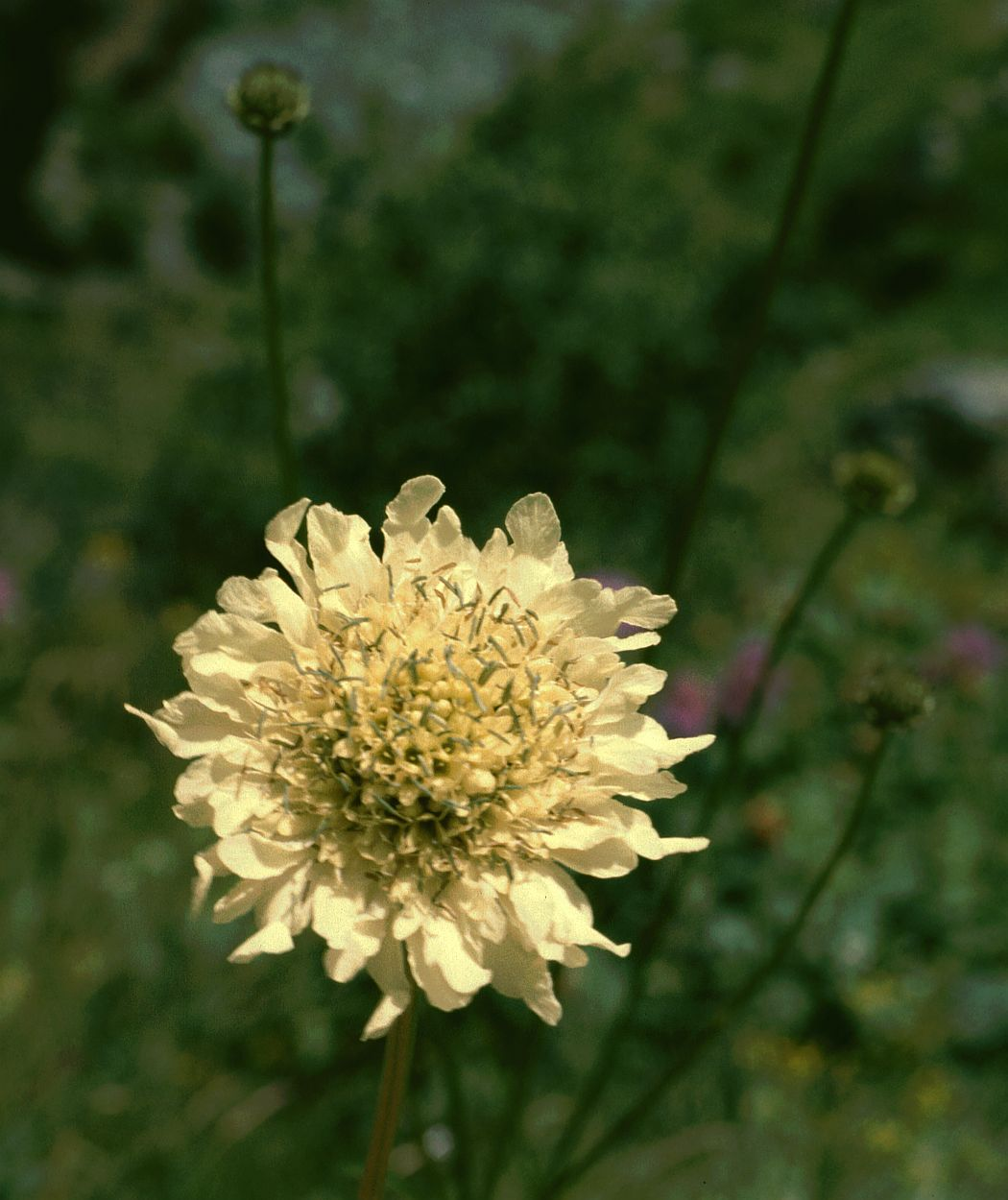 Riesen-Schuppenkopf (Cephalaria gigantea), Kardengewächse (Dipsacaceae) - Georgien/საქართველო (Sakartwelo): Großer Kaukasus, Terek-Tal, Dariali-Schlucht